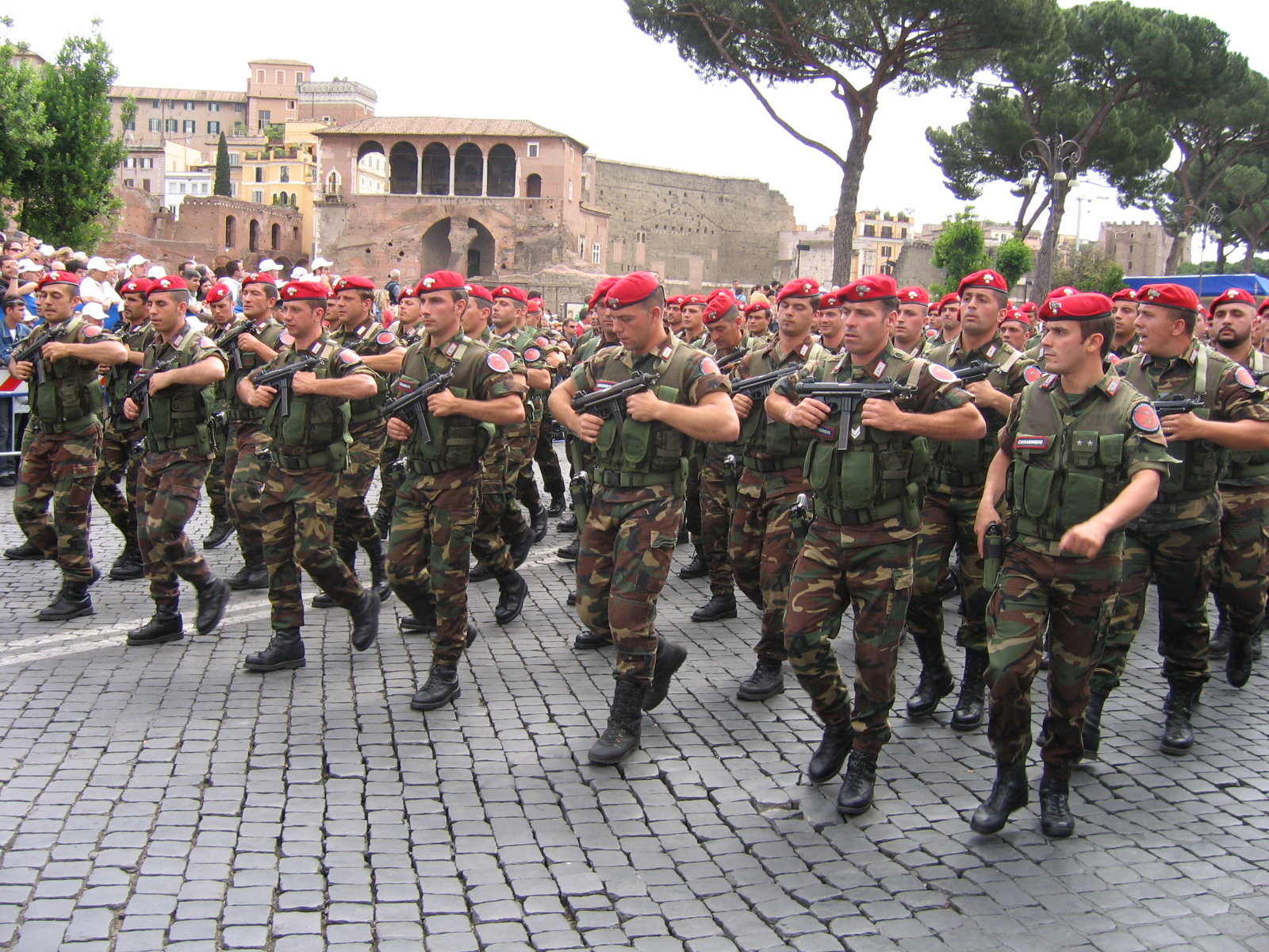 Photo of Army Parade in Rome, 2 june 2006, Festa della Repubblica Italiana. Carabinieri heli-deployment squadron Cacciatori "Calabria", Vibo Valentia